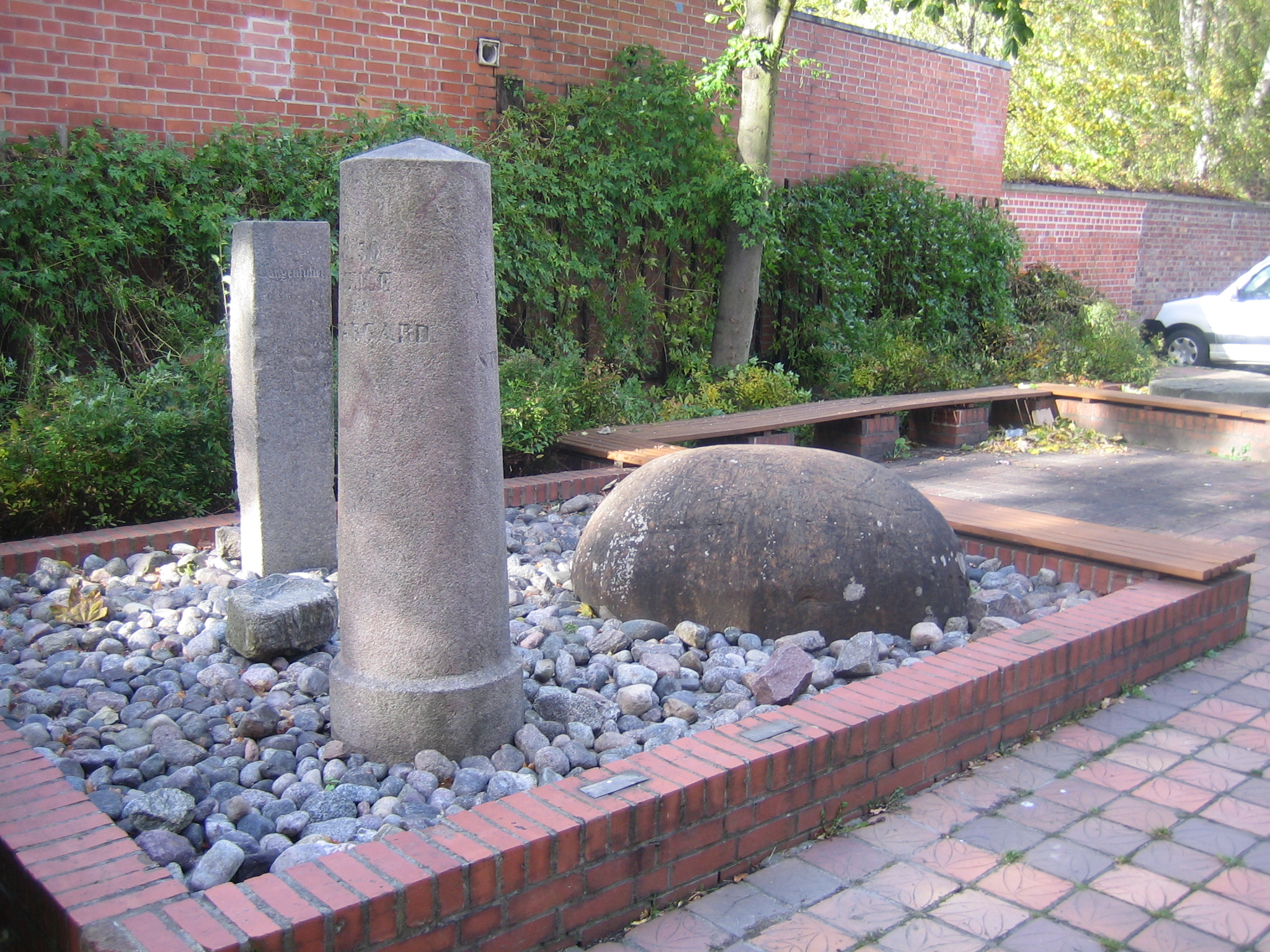 Meilenstein, Wegweiserstein und Findling „Brohmer Ei“, Pontanusstraße (an der Johanniskirche), Neubrandenburg, Mecklenburg-Vorpommern